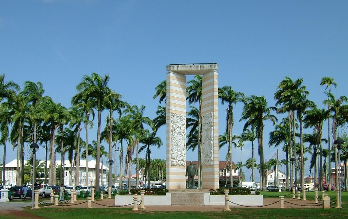 Description:Statue Felix Eboue sur la place des Palimistes Cayenne auteur:Didwin